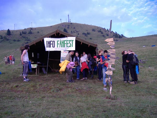 Puțini oameni au vizitat cortul de informare la FânFest 2005